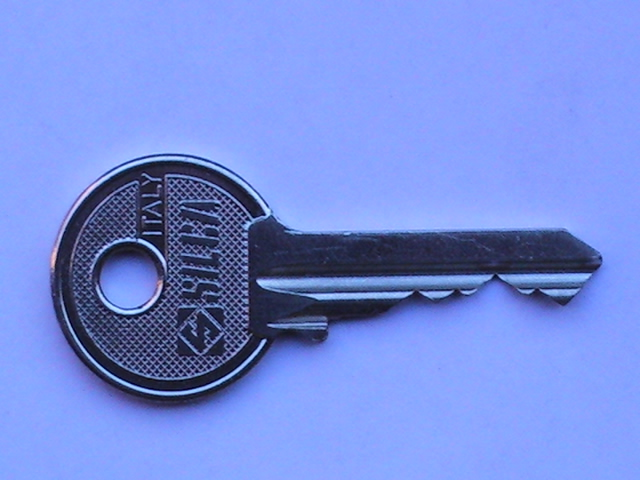 Foto di una chiave di tipo standard prodotta da Silca.